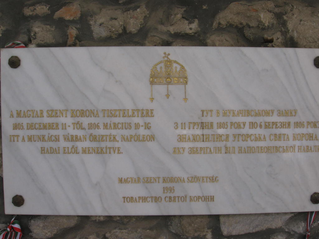 memorial